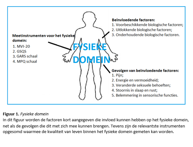 Figuur fysiek team rond